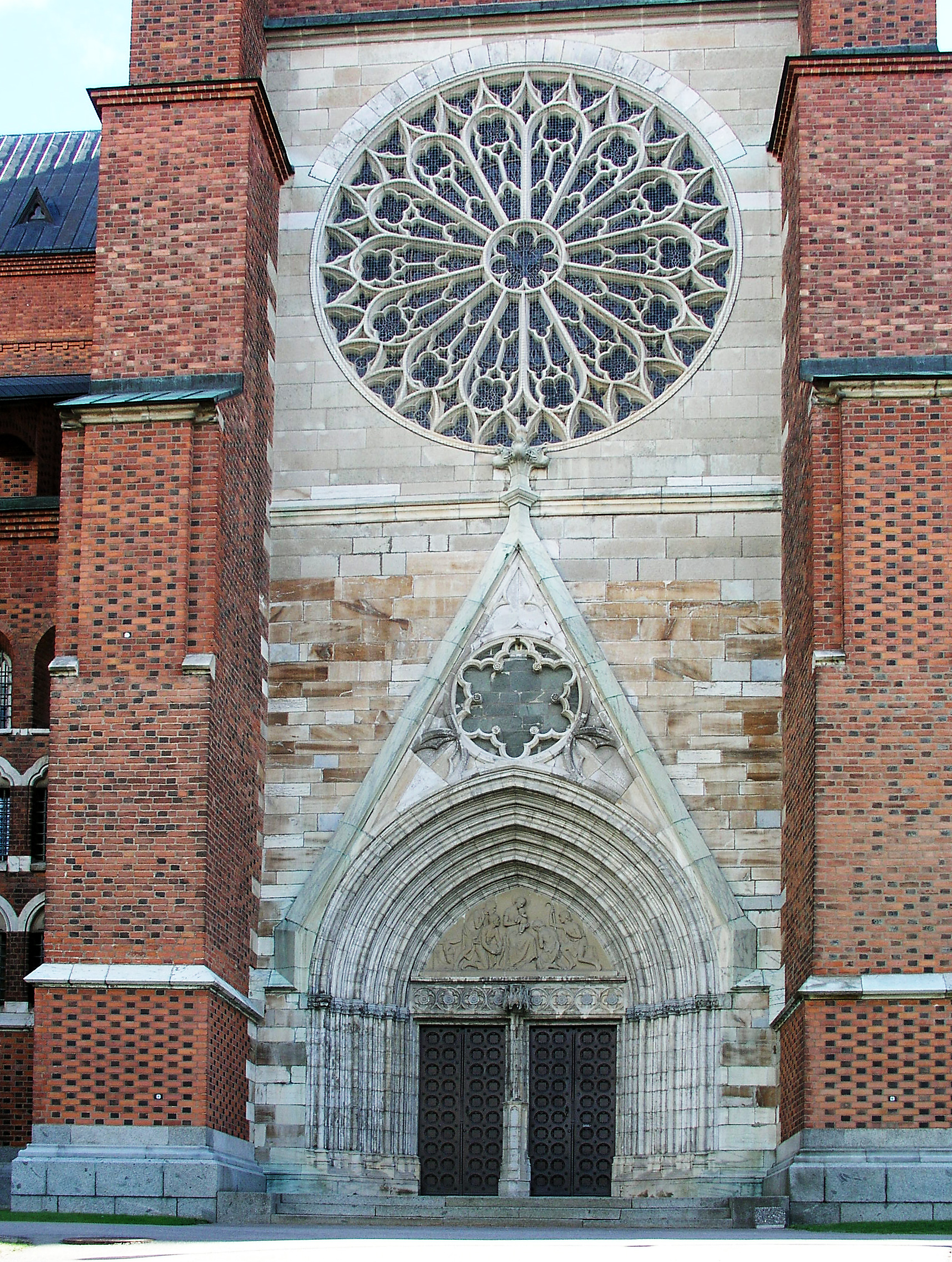 Uppsala domkyrka / Uppsala cathedral.